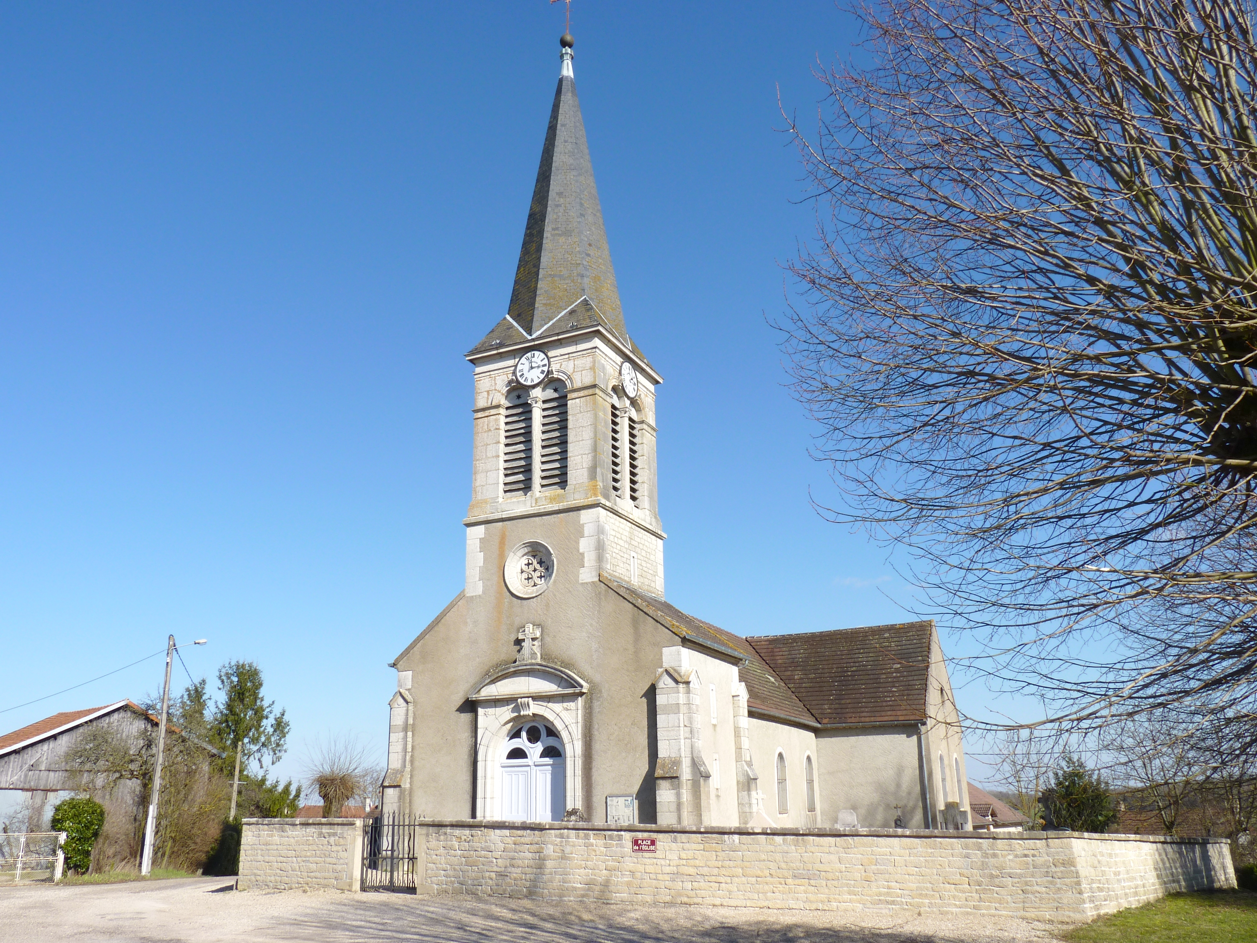 Église, Magny-lès-Aubigny (Côte d'Or, Bourgogne, France)